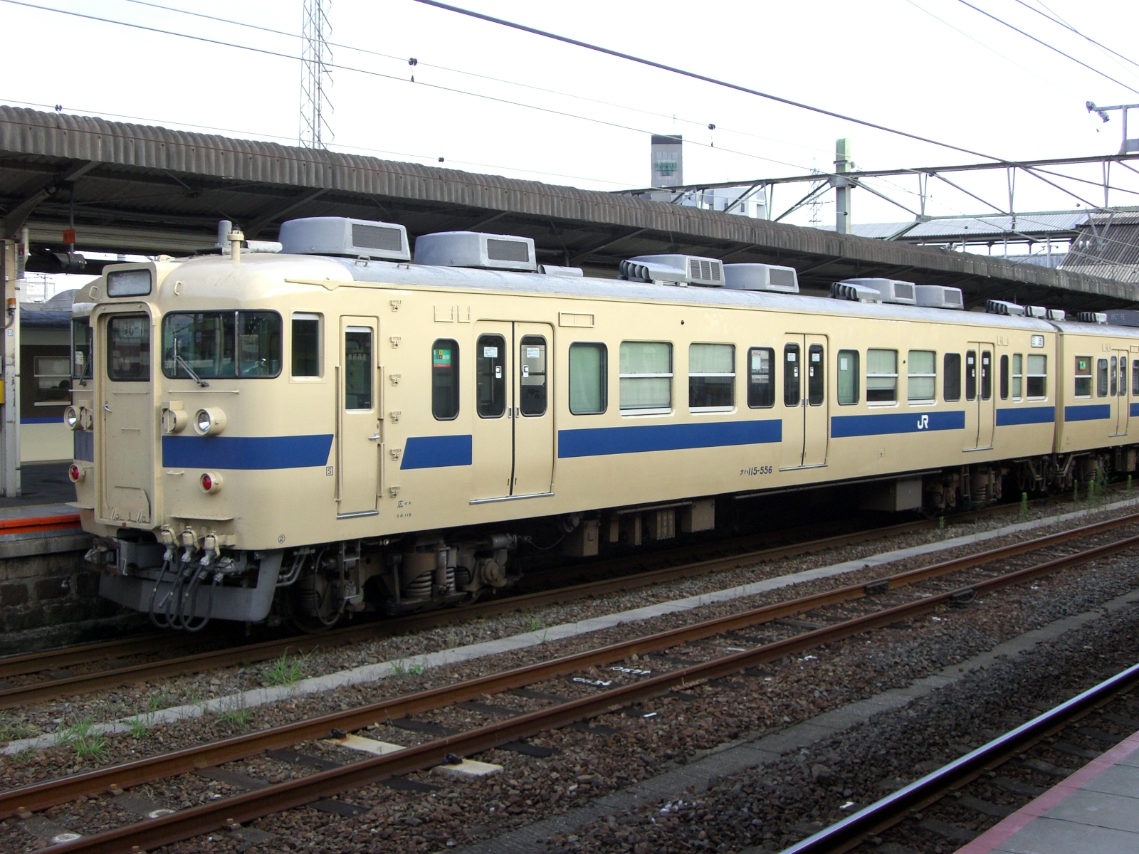 クハ115-556 岩国駅